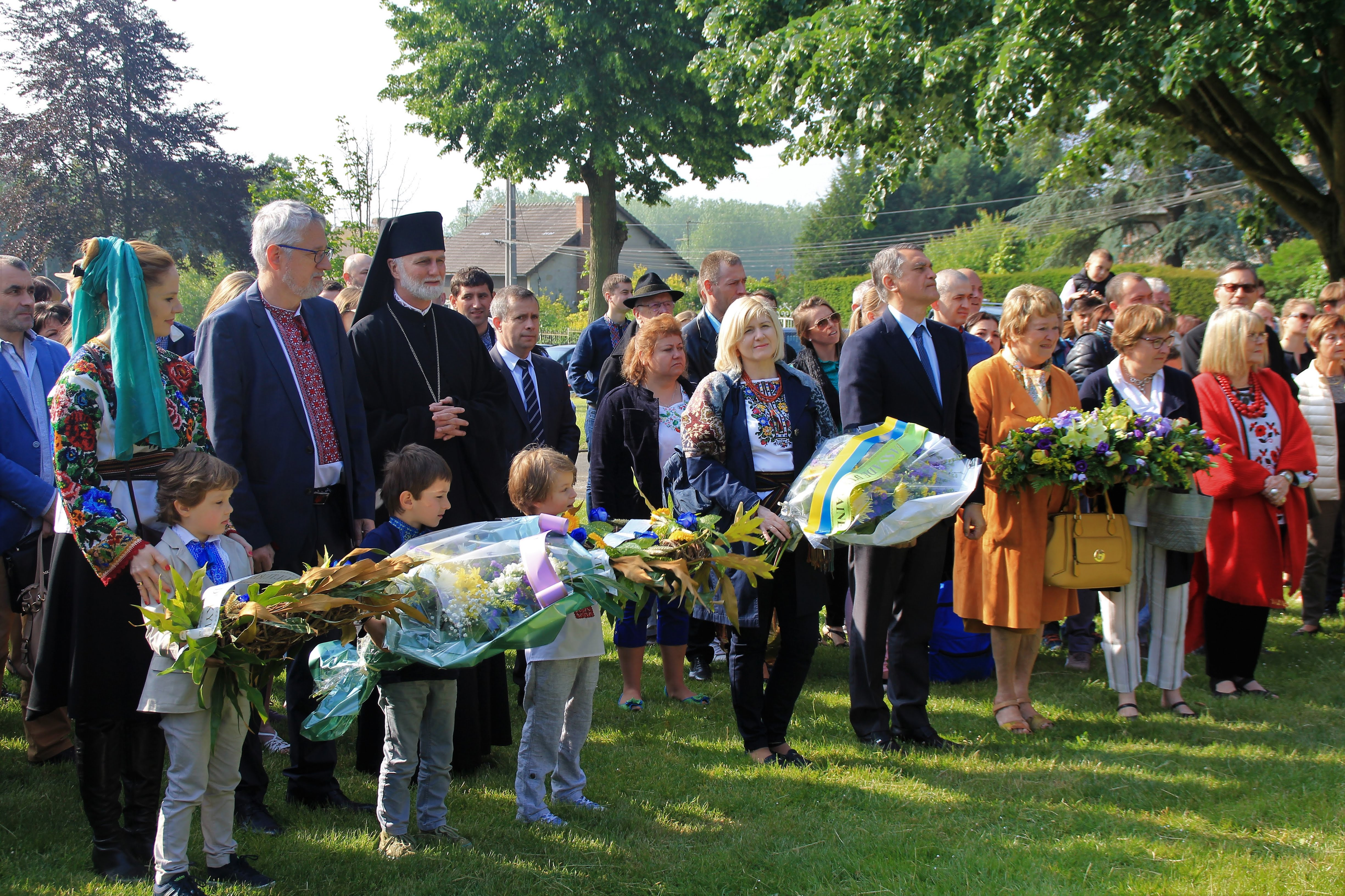 Церемонія покладання квітів на День Анни Київської в Санліс